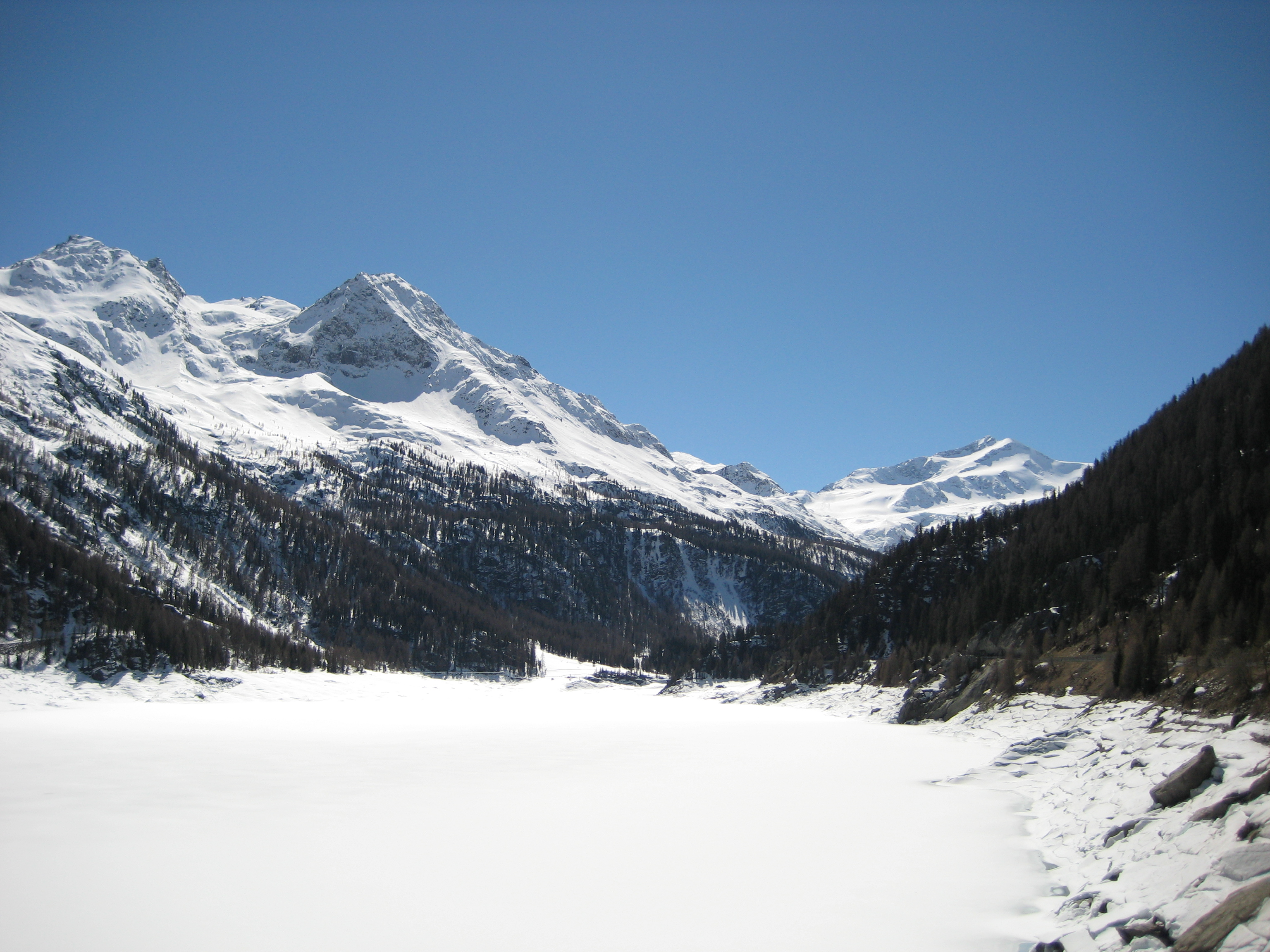 Zugefrorener Stausee und Vordere Rotspitze im Martelltal